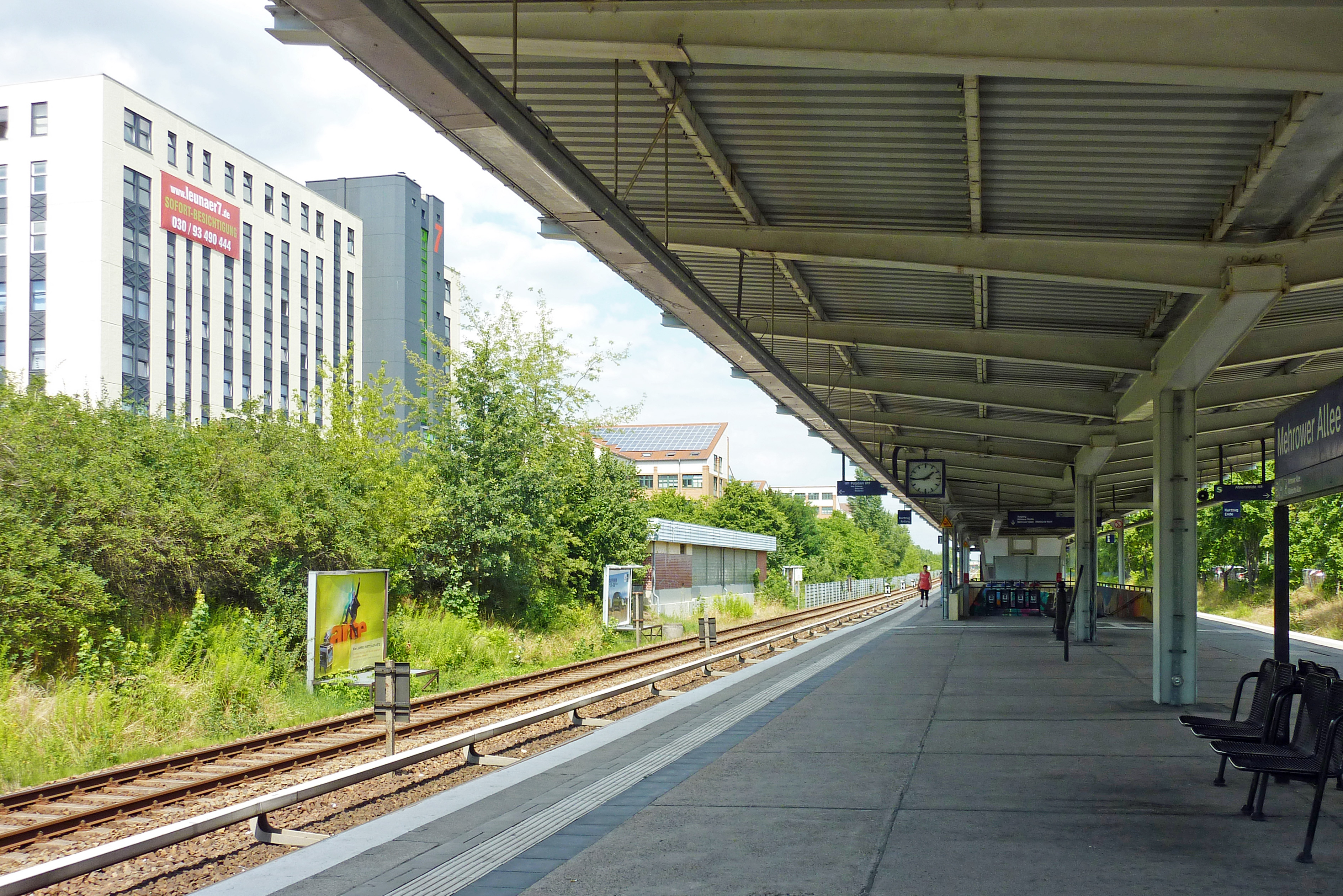 S-Bahnhof Mehrower Allee in Berlin-Marzahn. Nördliche Sicht am Gleis 2 auf Seiten der Premnitzer Straße.